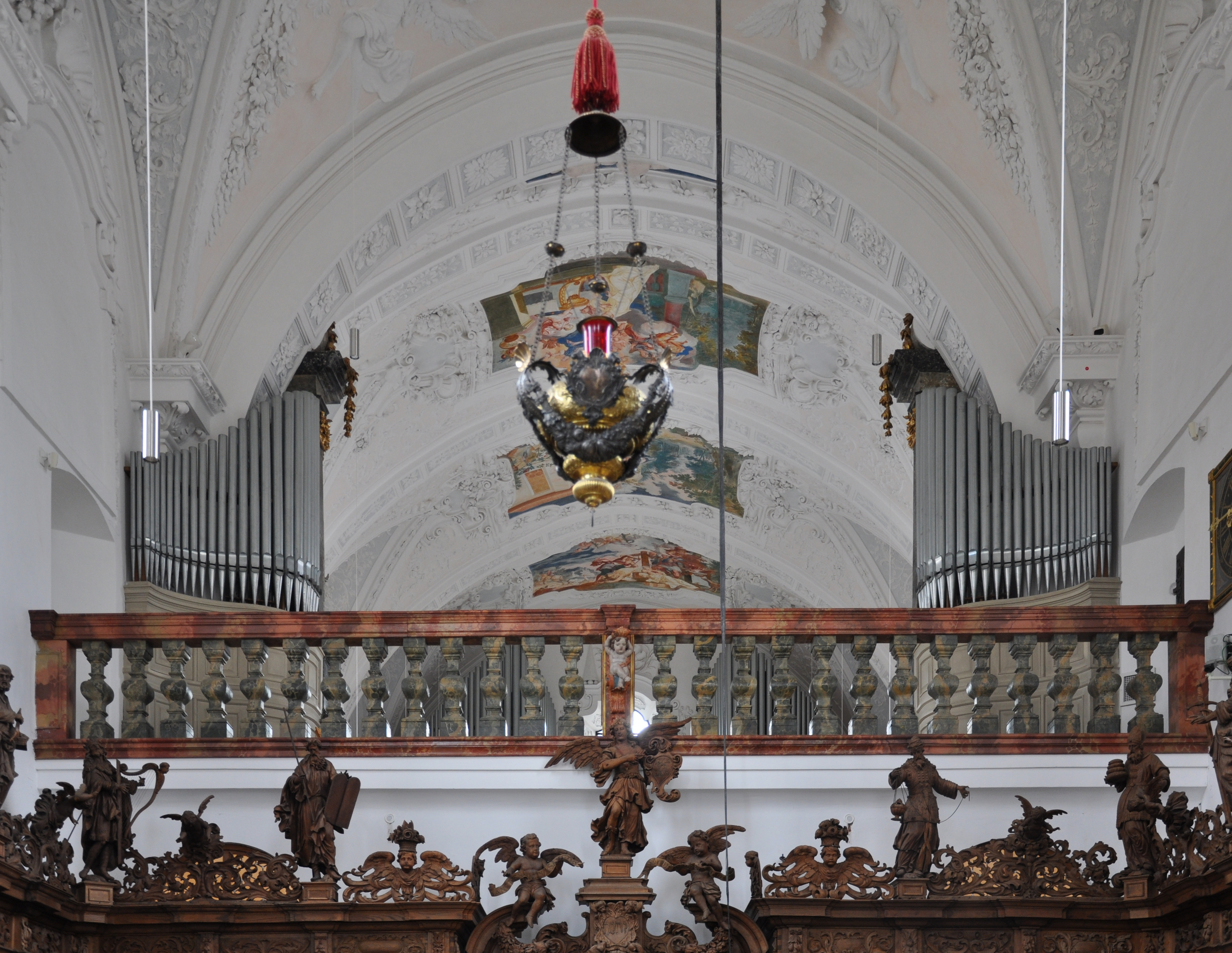 Buxheim, Kartause, Kartausenkirche St. Maria, Lettner mit Orgel